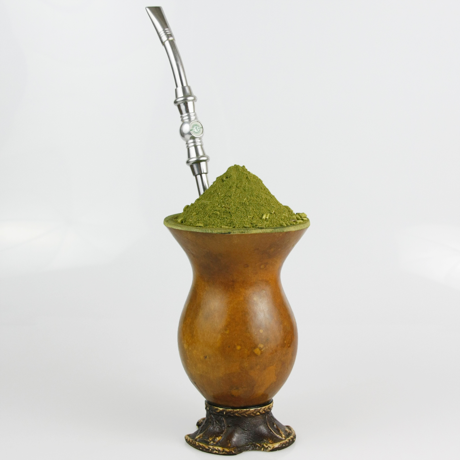 Mate chimarrão zaparzone metodą "invertido", czyli w sposób odwrócony. Najpierw nalana została woda, potem nasypany został susz. Cuia i wielka bombilla (tzw. bomba) to tradycyjne, brazylijskie akcesoria do picia naparu chimarrão.